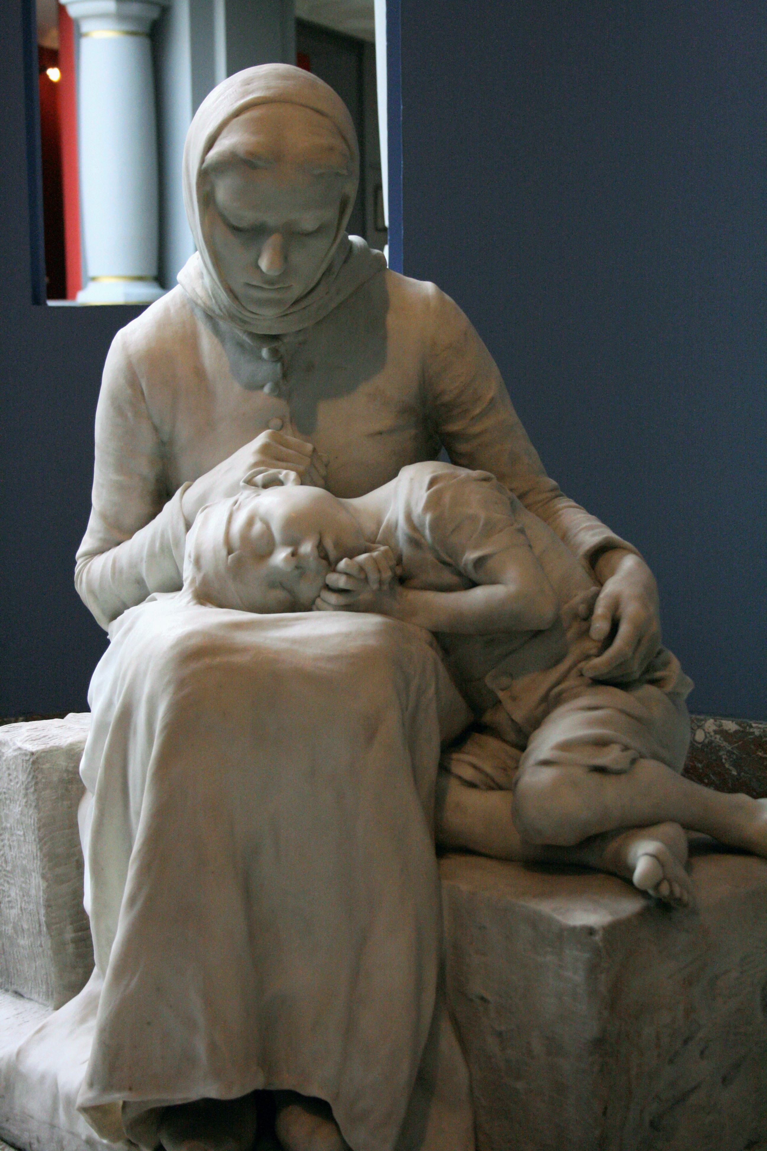 Inquiétude maternelle de Guillaume charlier (1854-1925), Musée des Beaux-Arts de Tournai, Belgique